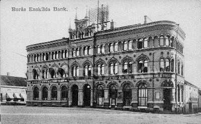 Borås Enskilda Bank. Västerlånggatan. Kv. Medea. Byggnadsår 1891-95. Arkitekt Adrian Peterson.